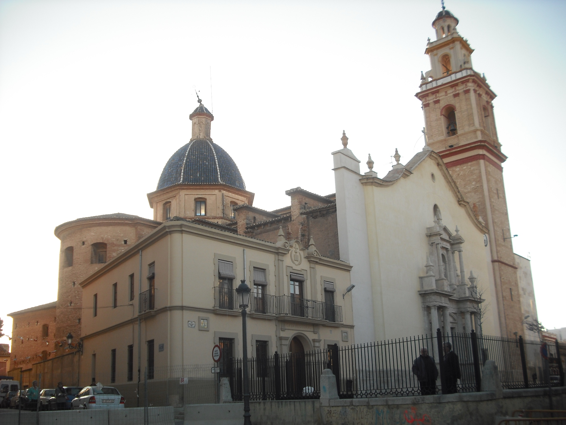 Església de Sant Miquel de Burjassot.